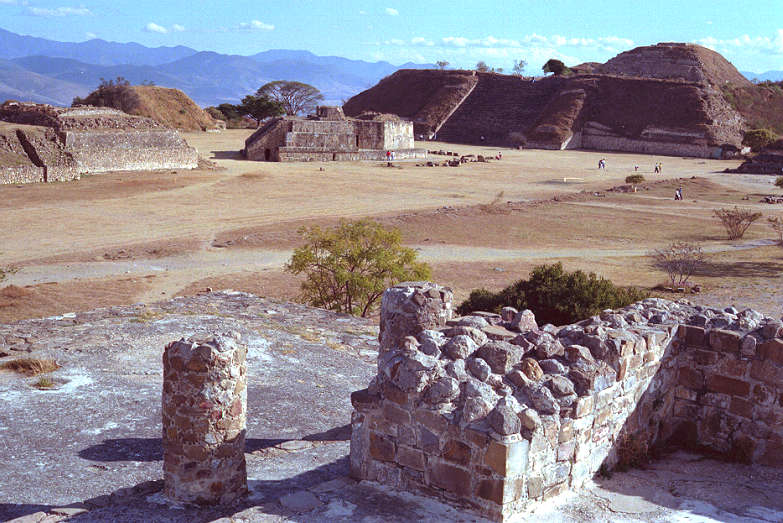 Monte Albán, Oaxaca, Mexiko